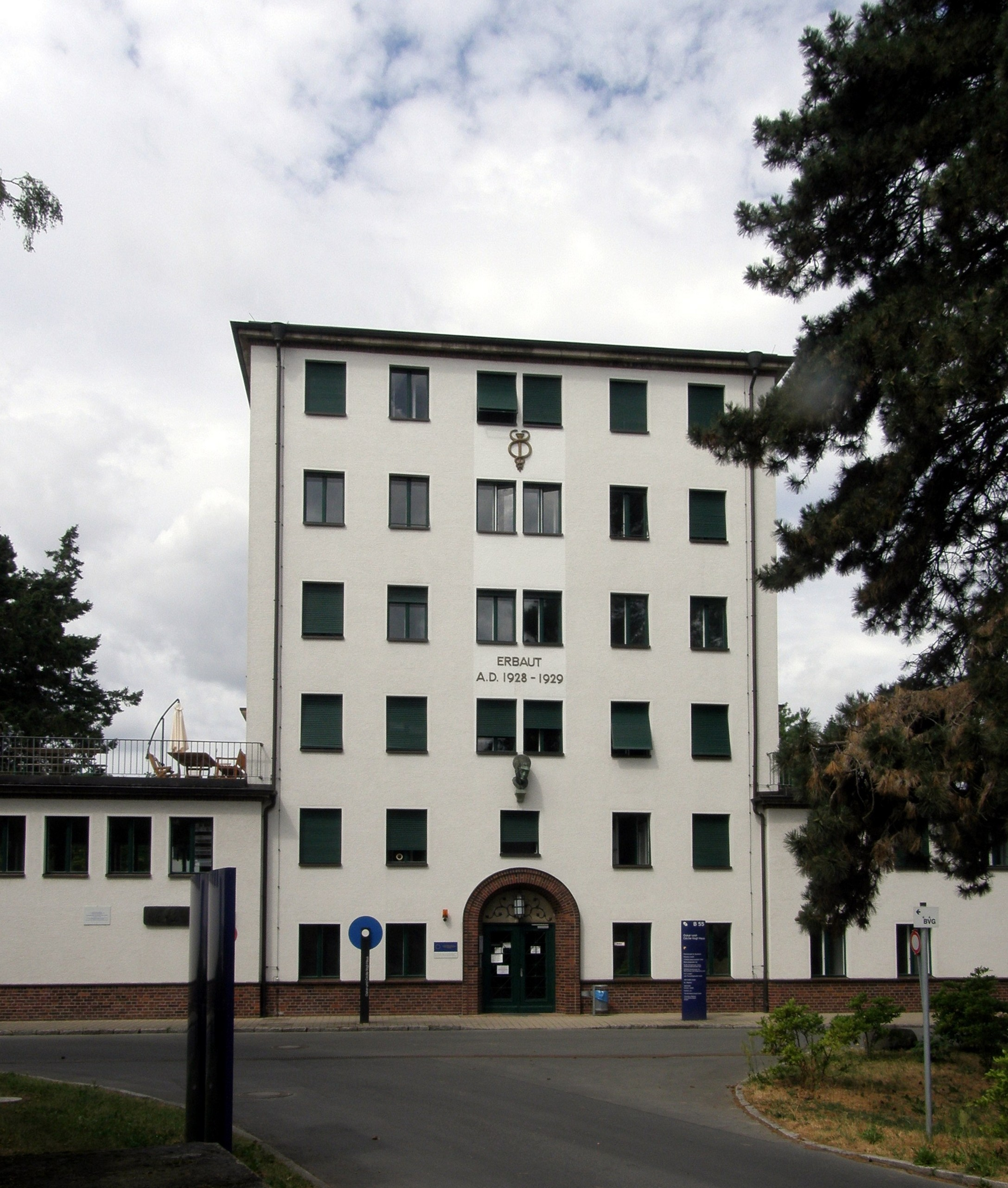 Nach Entwürfen des Architekten Carl Sattler 1928 bis 1929 errichtetes Gebäude des Instituts für Hirnforschung der Kaiser-Wilhelm-Gesellschaft in Berlin-Buch.